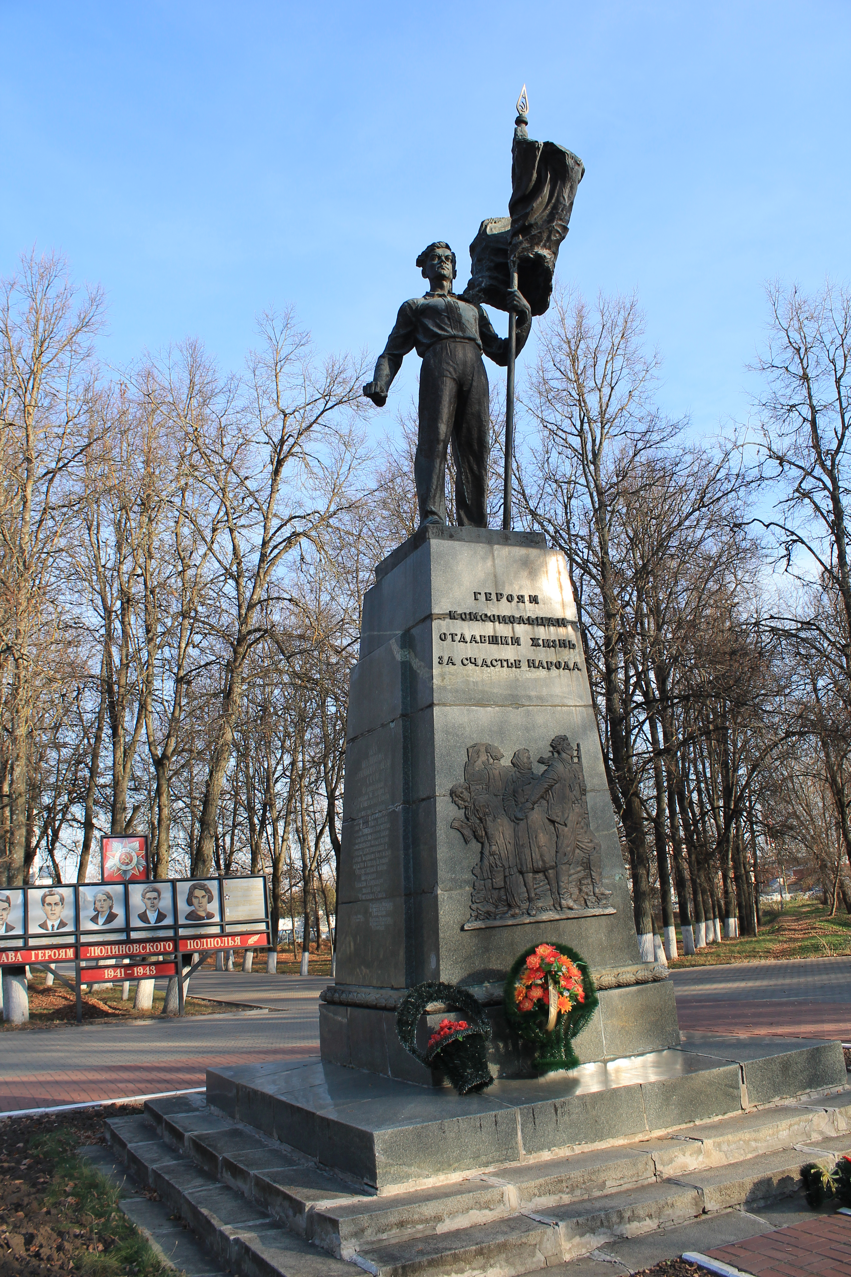 Памятник комсомольцам Людиновской комсомольской подпольной организации, погибшим в борьбе с немецко-фашистскими захватчиками в годы ВОВ (Калужская область, Людиново, Сквер, у центральной площади города)